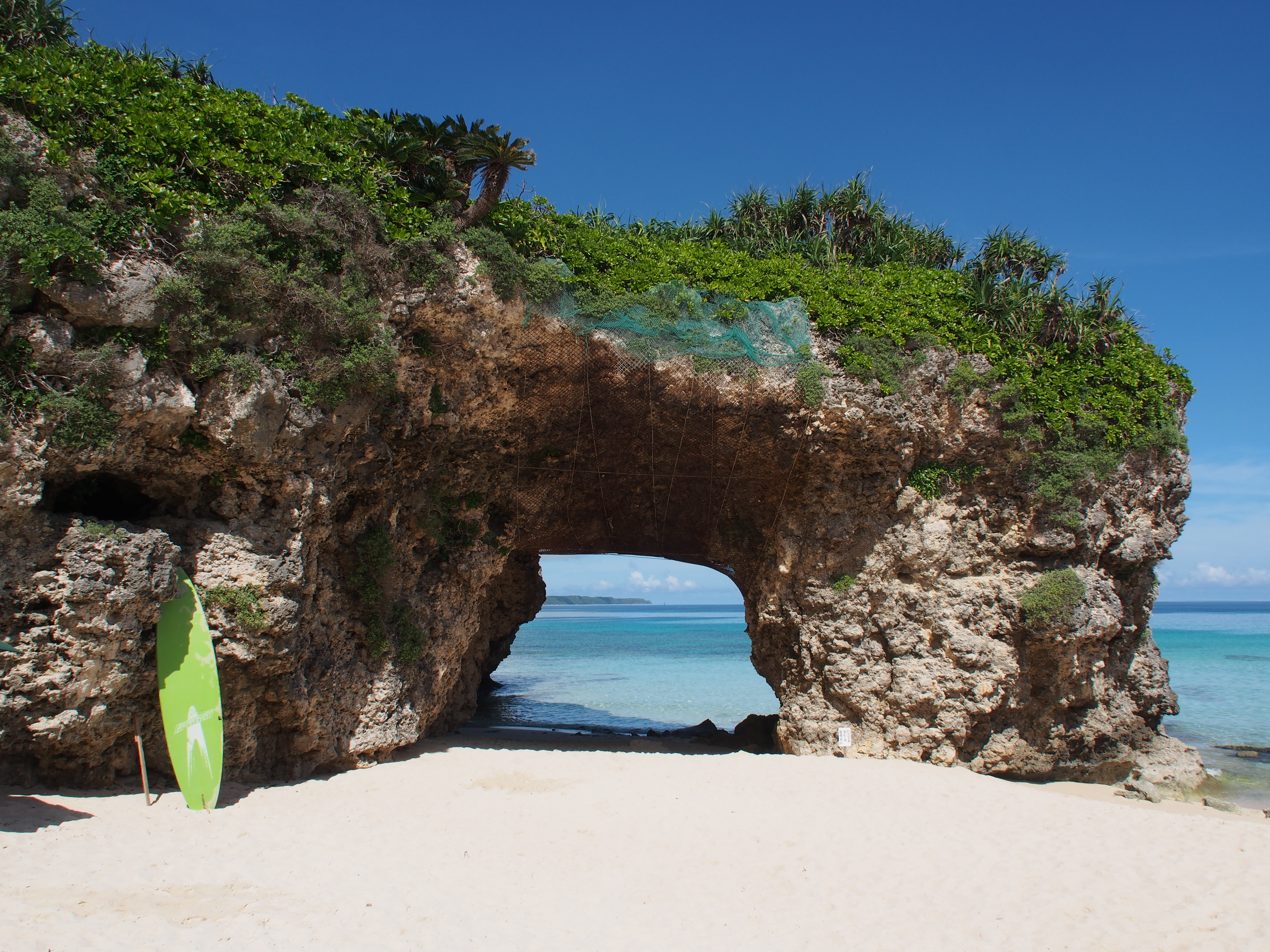 砂山ビーチ（沖縄県宮古島市宮古島）